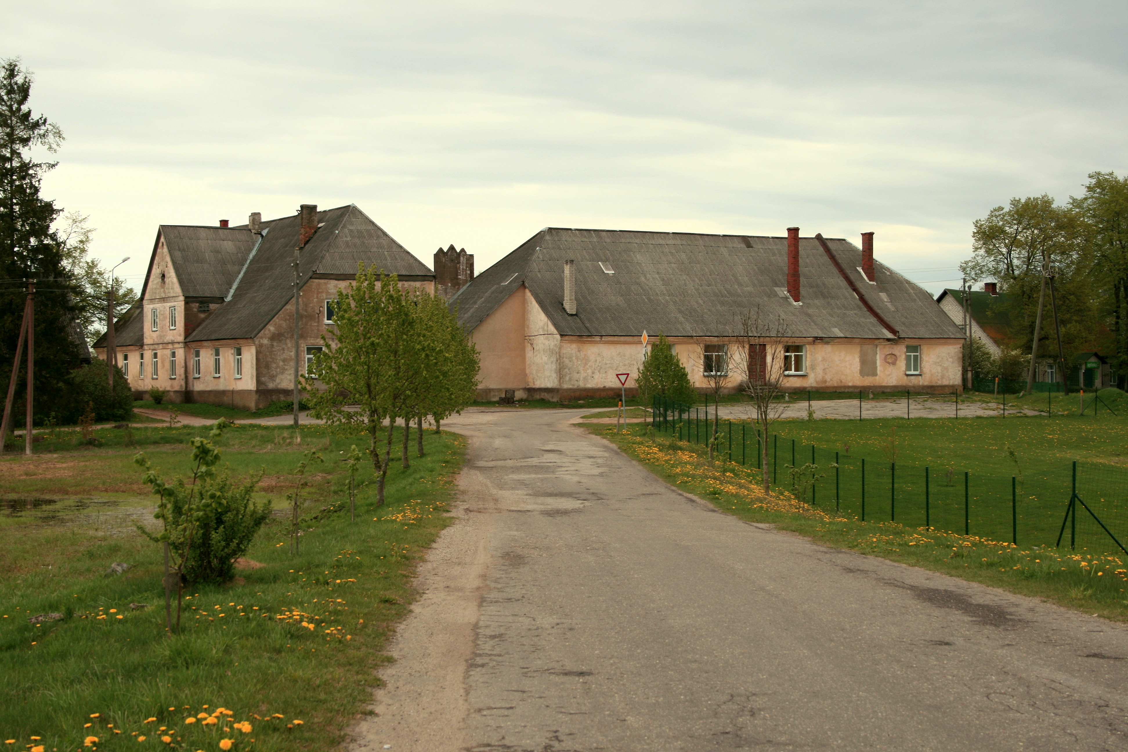 Kultūras nams "Gaisma" Ugālē